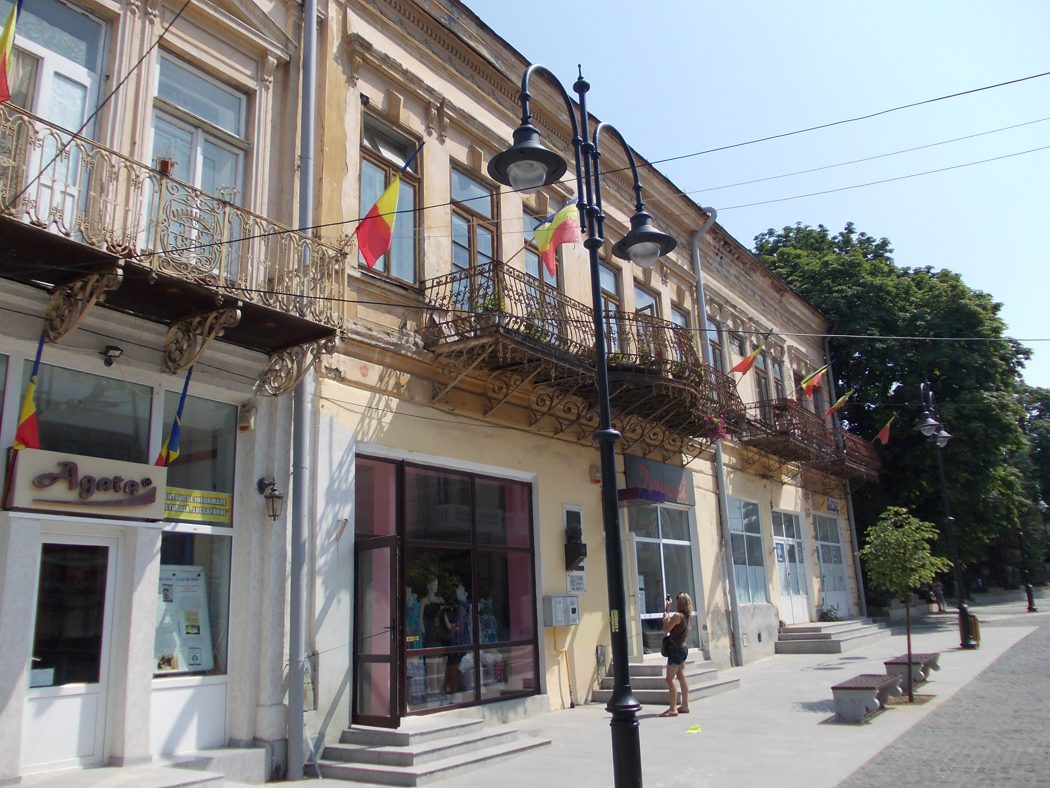 casa în care a copilărit Eminescu până la 4 ani